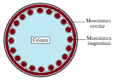 Na ilustração é possível observar a disposição das camadas musculares presentes na parede corporal de um Sipuncula: a camada de musculatura circular, mais externa, e a de musculatura longitudinal, mais interna.